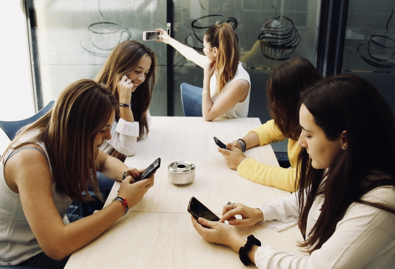 Esta fotografía representa la sociedad actual. Las nuevas tecnologías perjudican gravemente las relaciones sociales ya que son las culpables de cambiar una sociedad que se comunica cara a cara a una sociedad enganchada a Internet y a las redes sociales.